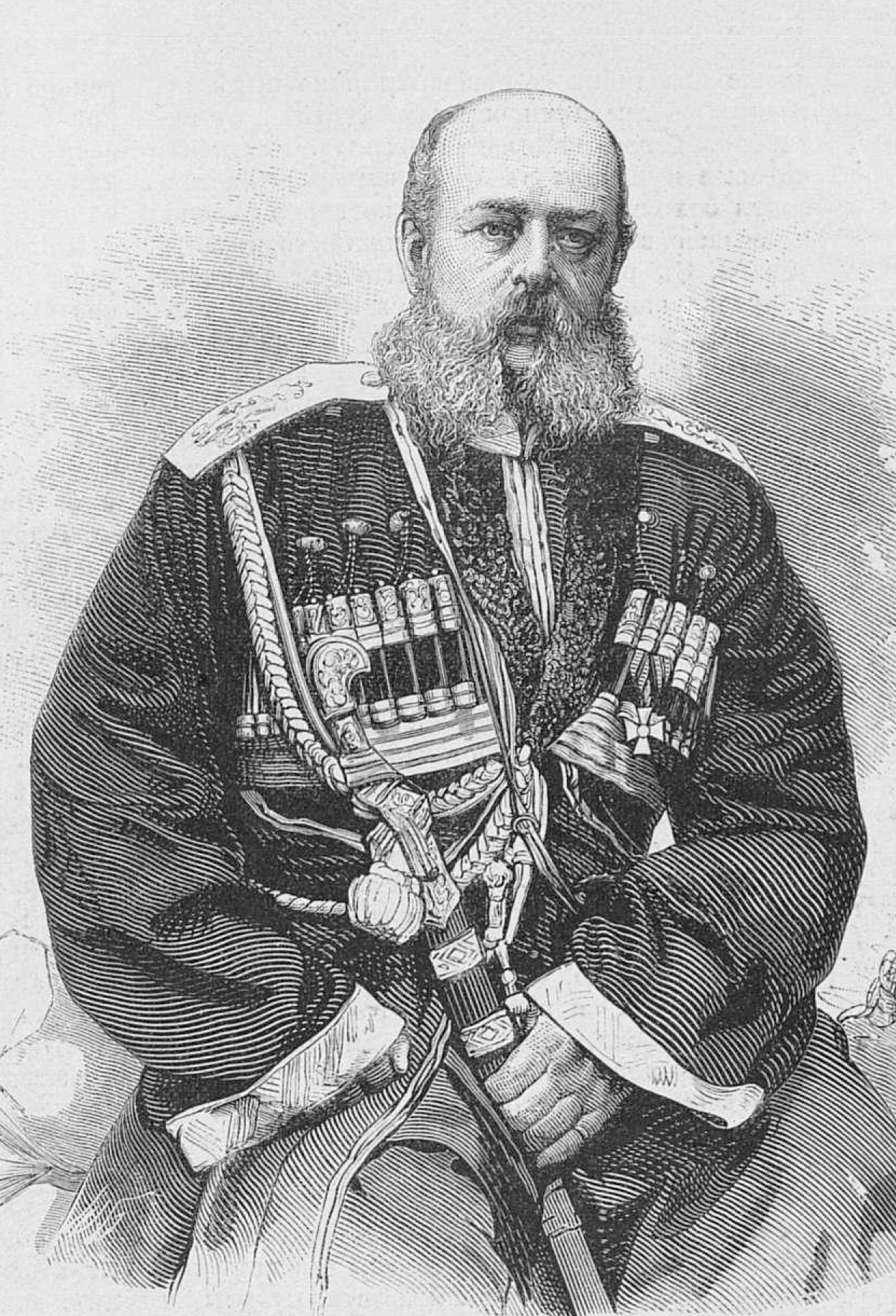 Скобелев Дмитрий Иванович (1821-1879)